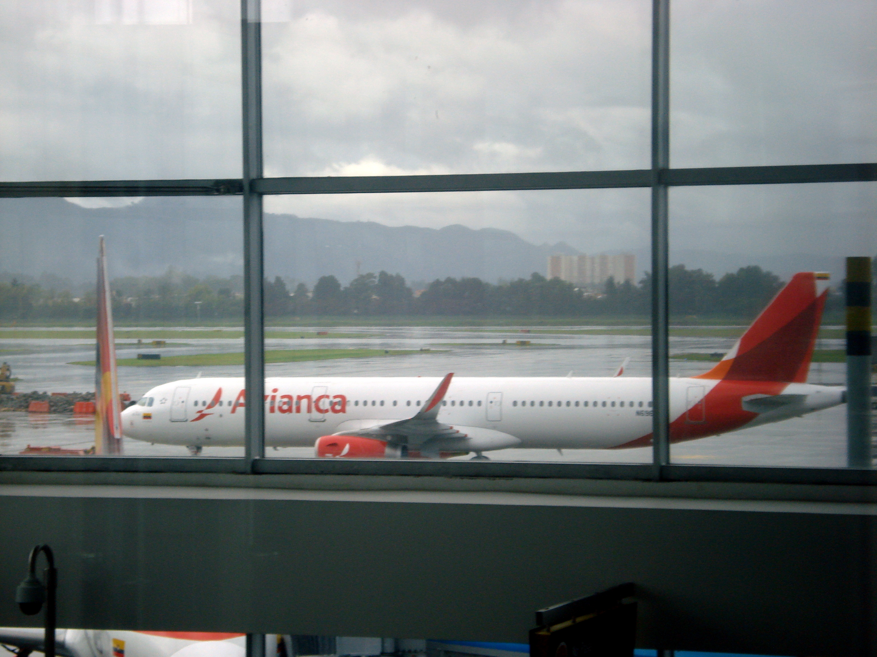 Avianca Airbus A321 en el Aeropuerto EL DORADO